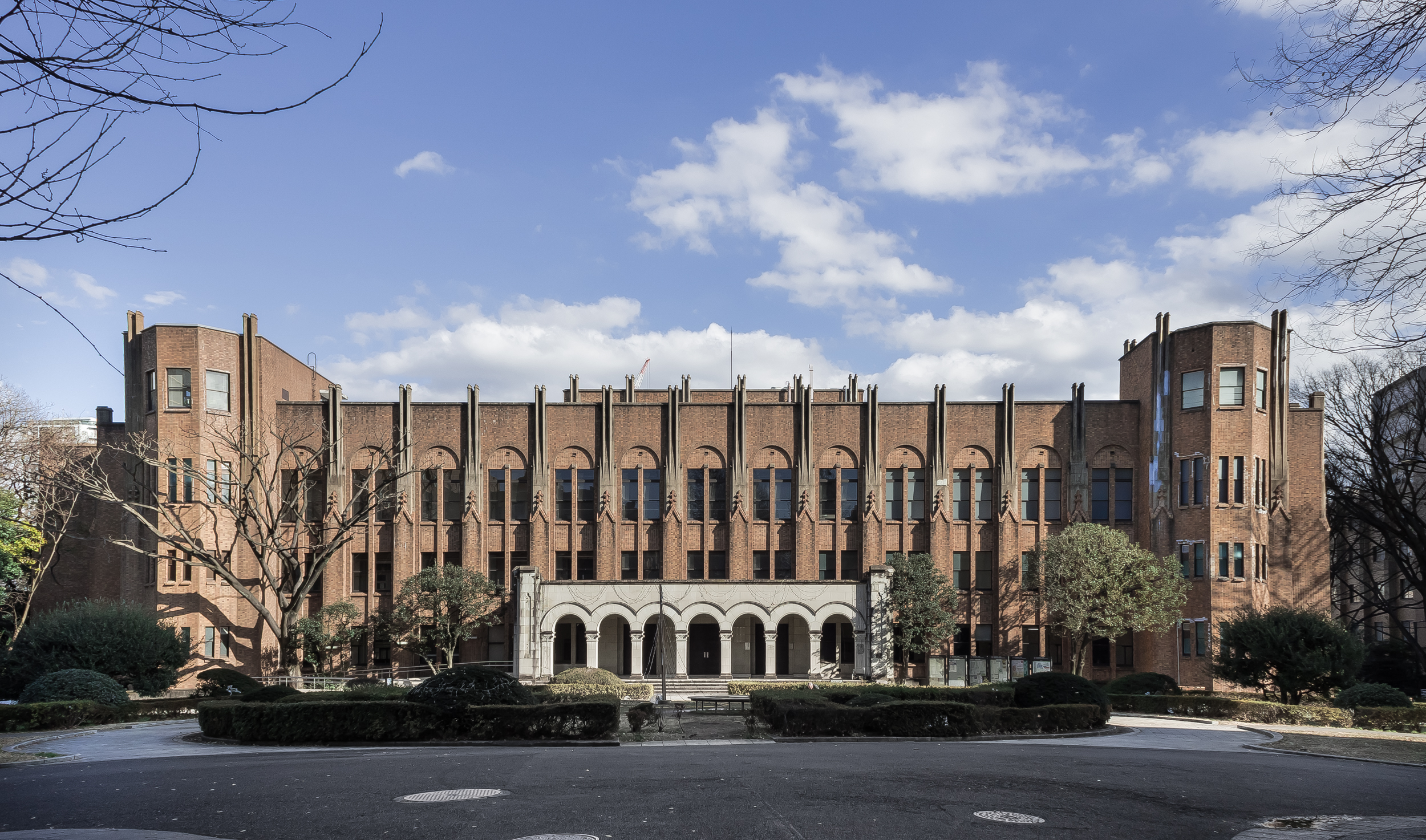 東京大学医学部2号館,内田祥三(1936年)。